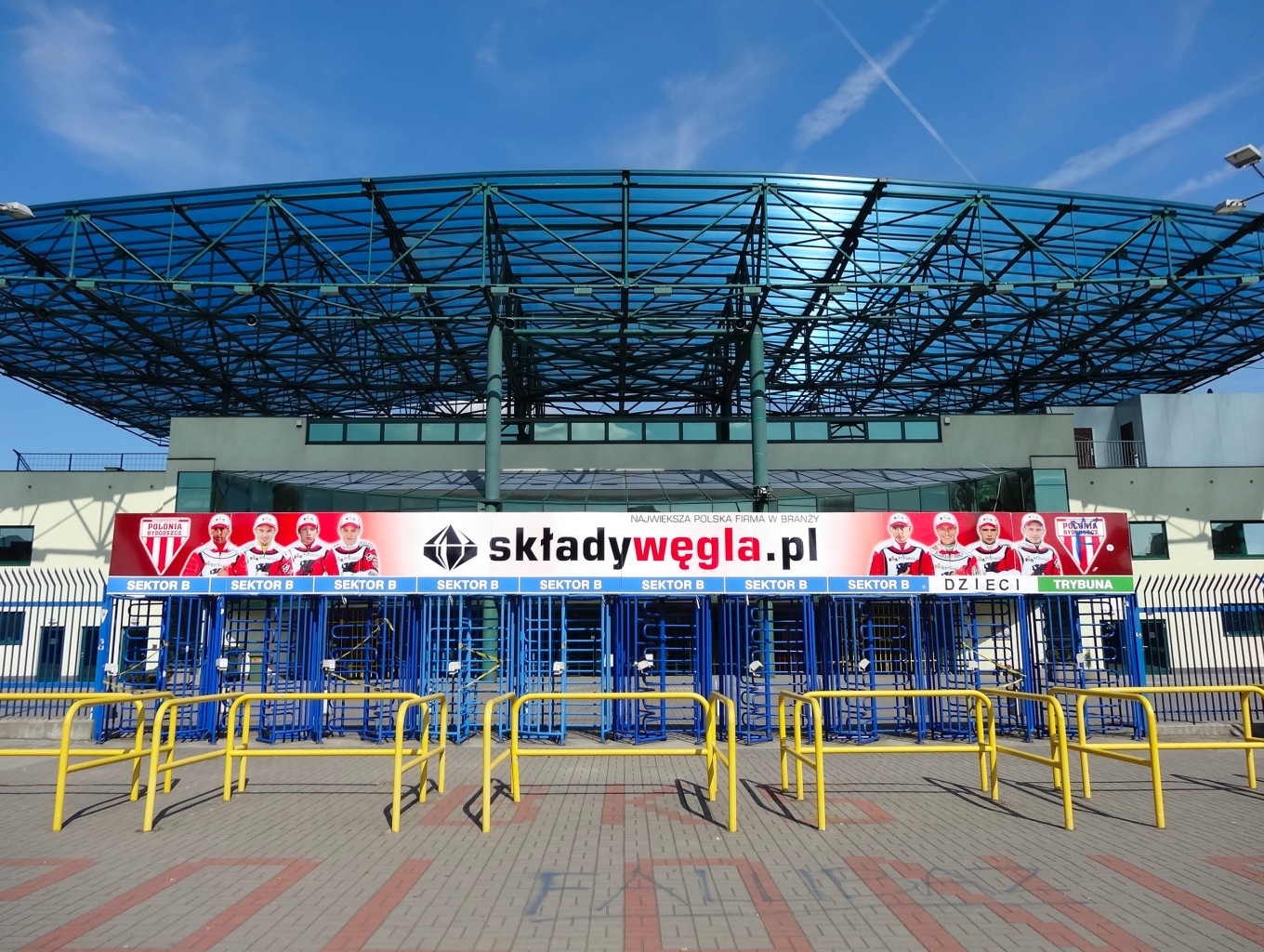 Stadion Polonii Bydgoszcz - widok od frontu (strona zachodnia)